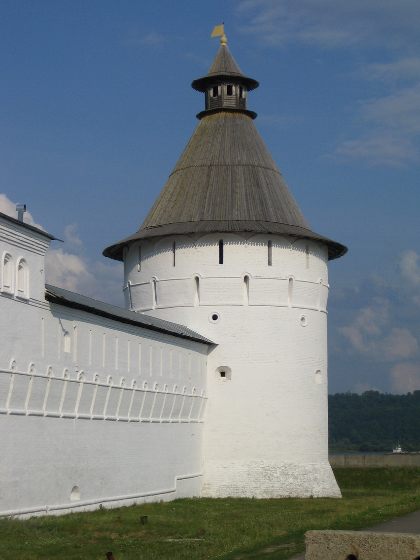 Одна из башен Макарьевского монастыря. Makaryev Monastery tower.